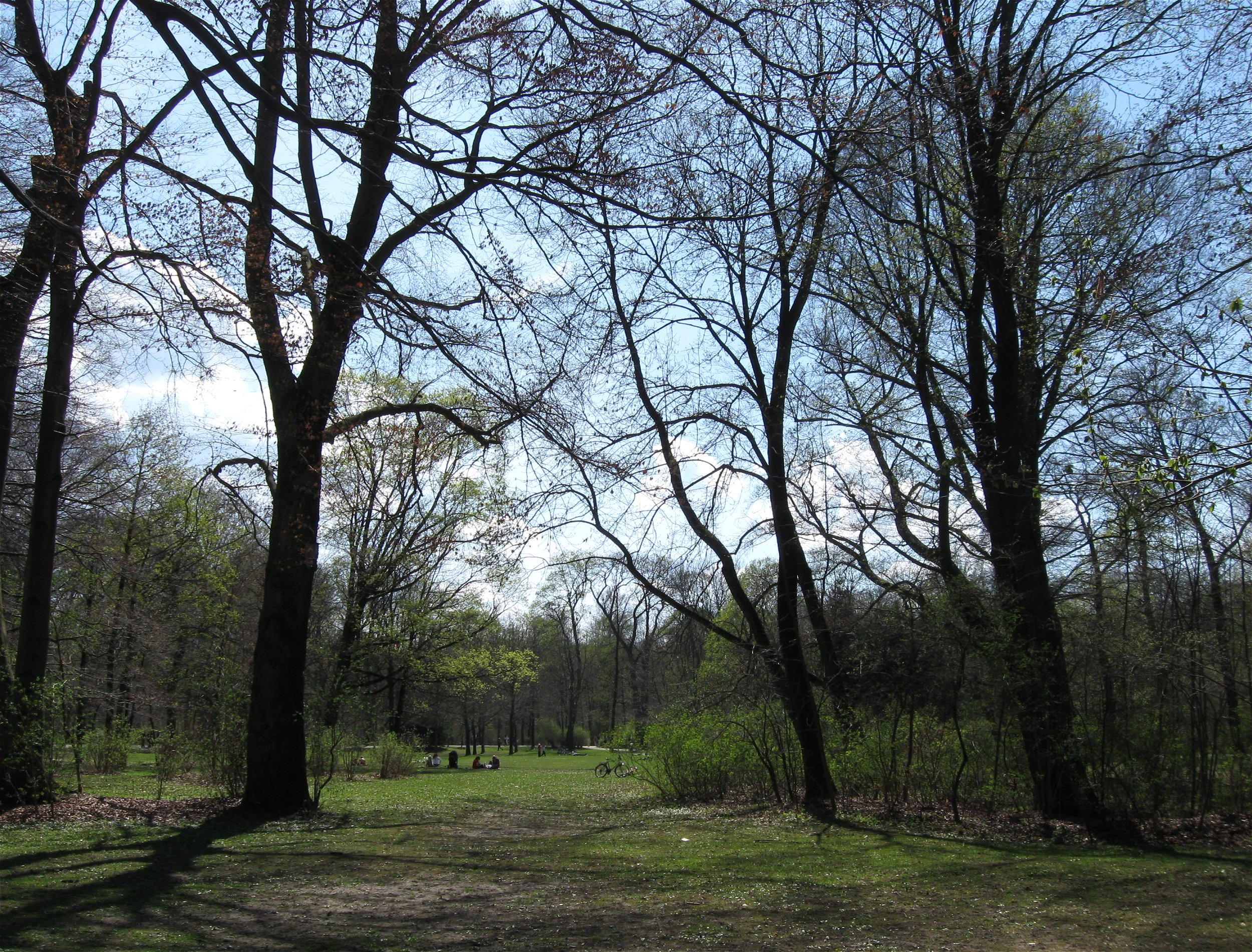 Englischer Garten, Nordteil (Hirschau), München